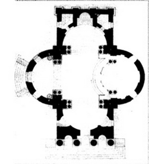 План ц-ва Св. Катерини: Муринська ц-ва. план